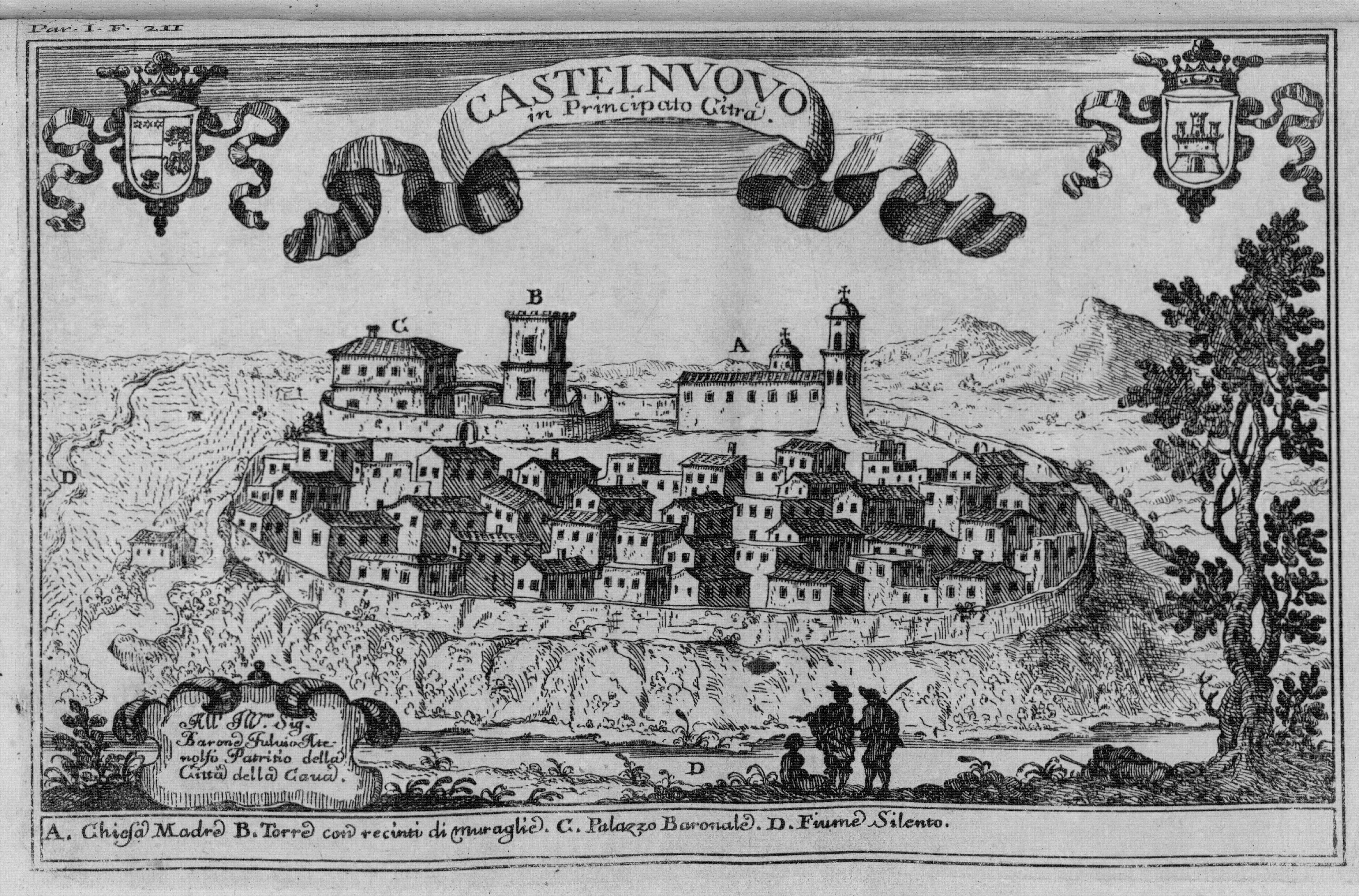 Autor: Pacichelli, Giovanni Battista, 1641-1702 Descripción bibliográfica: Il regno di Napoli in prospettiva : diviso in dodeci provincie, in cui si descrivono la sua Metropoli Fidelissima città di Napoli ... Opera postuma divisa in tre parti / dell'abatte Gio. Battista Pacichelli ; Parte prima [-terza] ... Del regno di Napoli in prospettiva / dell'abate Pacichelli. Parte prima. - In Napoli : nella Stamperia di Michele Luigi Mutio, 1703. - v. : principalmente il.; 4º . - Inic. adorn. y frisos dec. - Grab. calc. y h. pleg. grab. calc. de mapas de Cassianus de Silva. Ilustrador: Cassiano De Silva, Francesco, il. Impresor: Muzio, Michele Luigi, imp. Lugar de impresión: Italia. Nápoles Localización: Vea la ilustración en su contexto